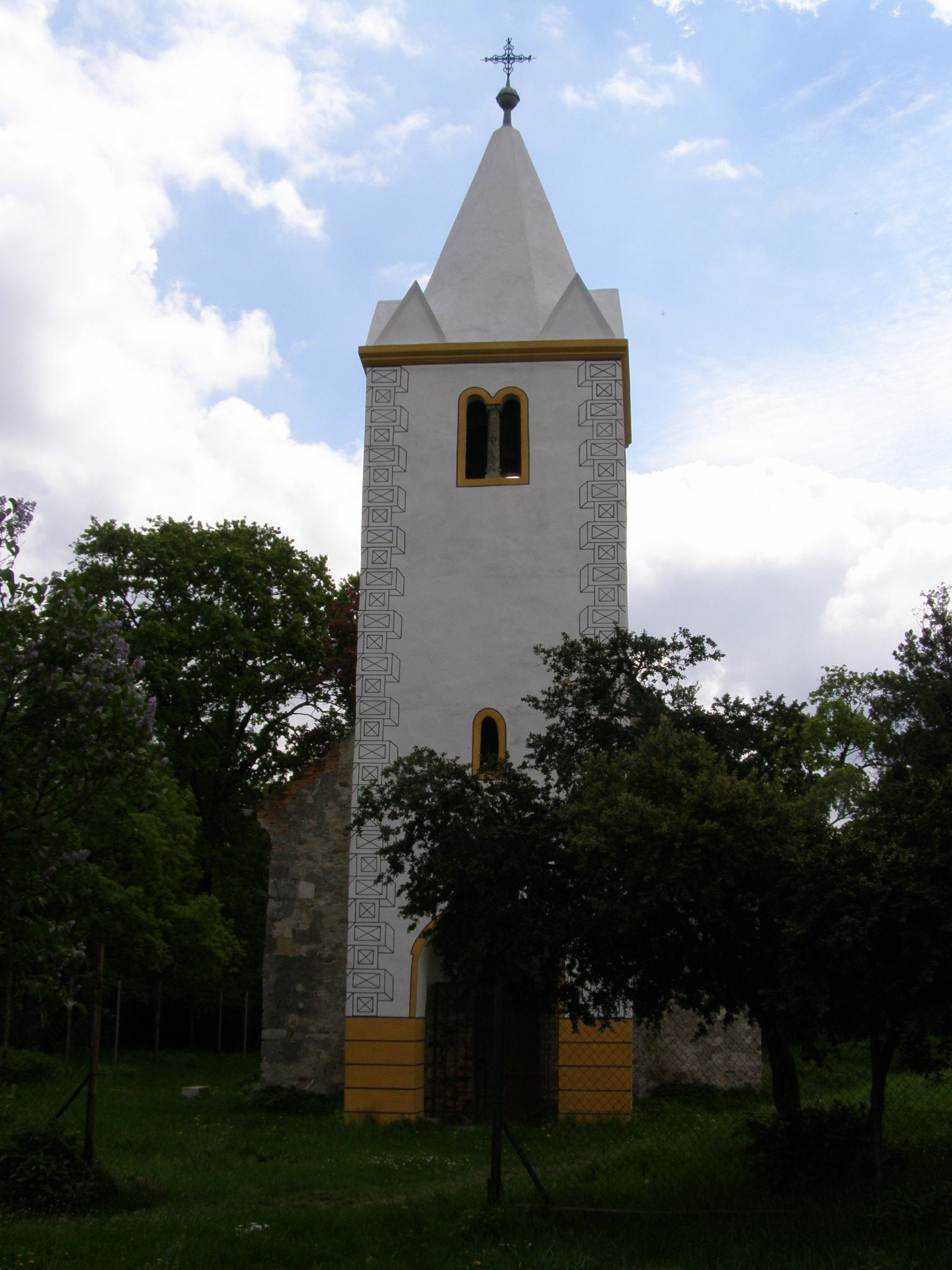 Rusovce - Kostol sv. Víta, pohľad zo západu